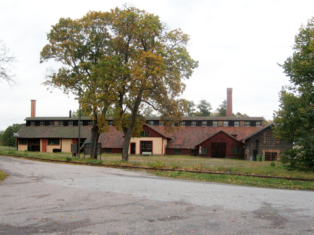 Lancashiresmedjan i Ramnäs, Västmanland.